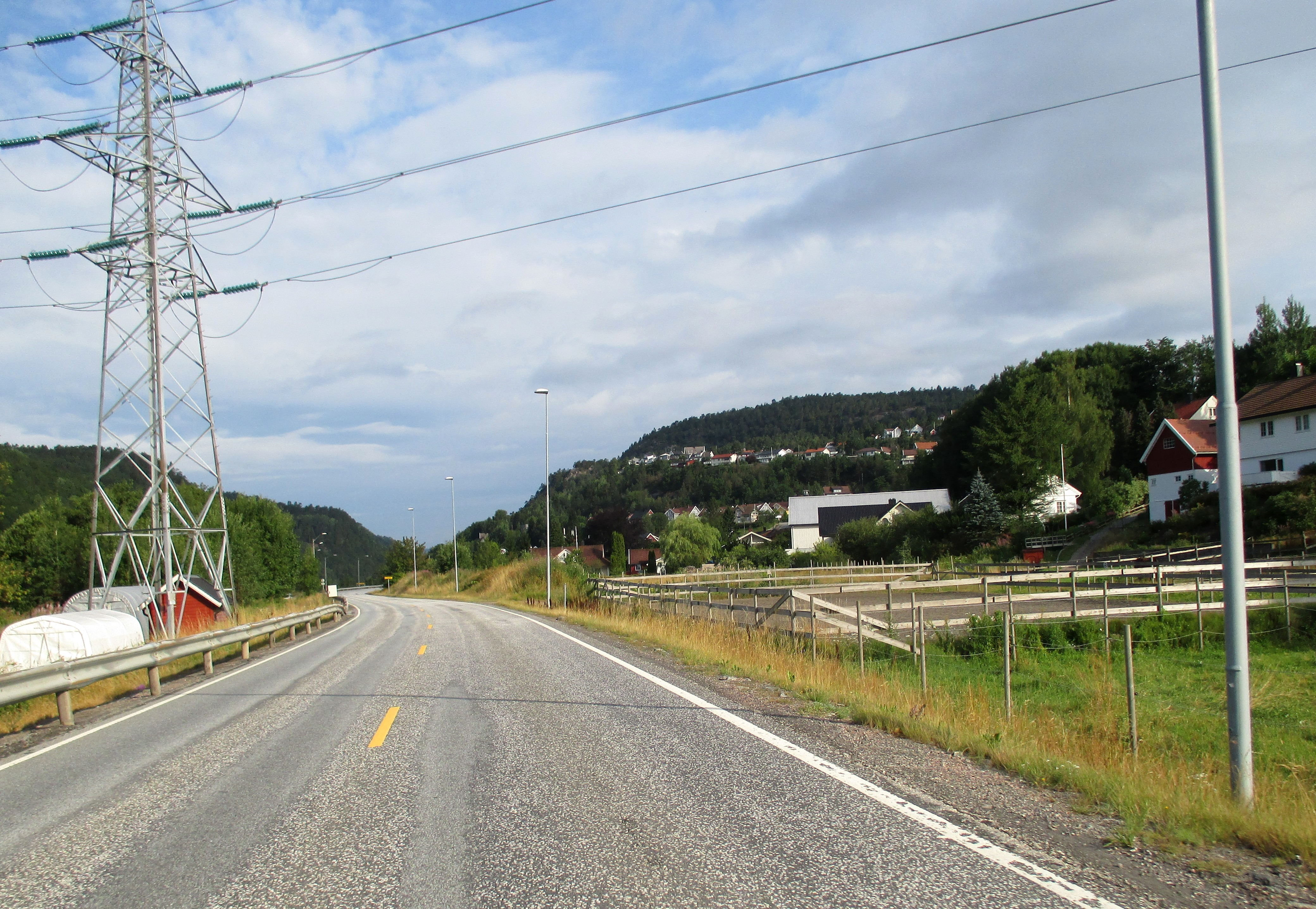 Torridalsveien i Kristiansand kommune er fylkesvei 1 i vest-Agder.